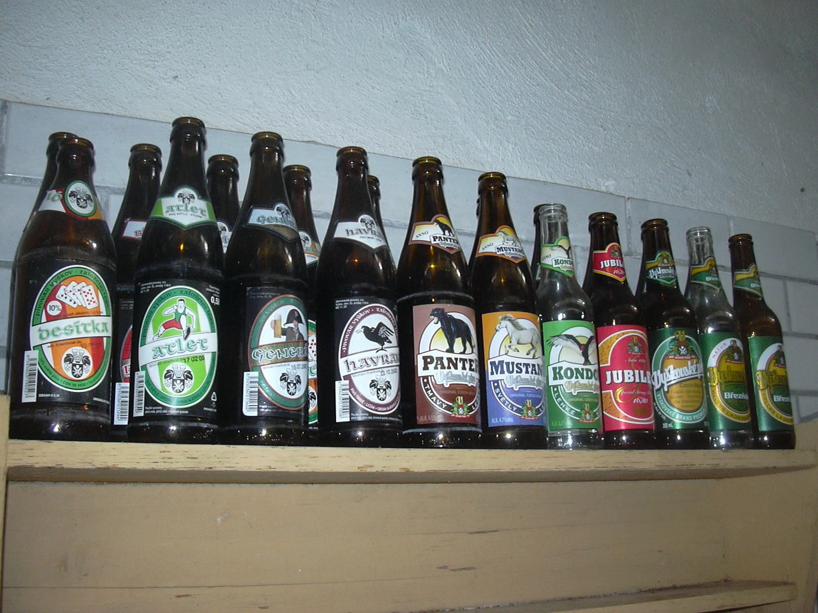 Vyškovské pivo (Beer- czech republic)